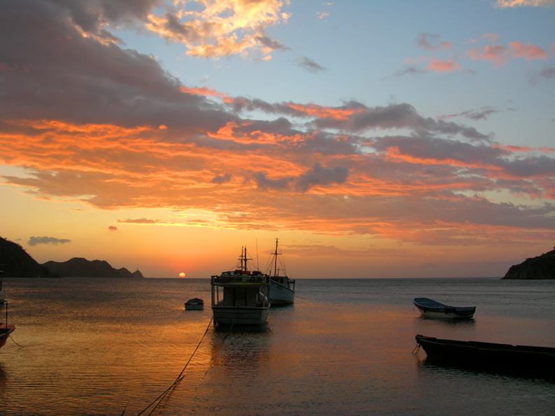 Fuerte El Morro